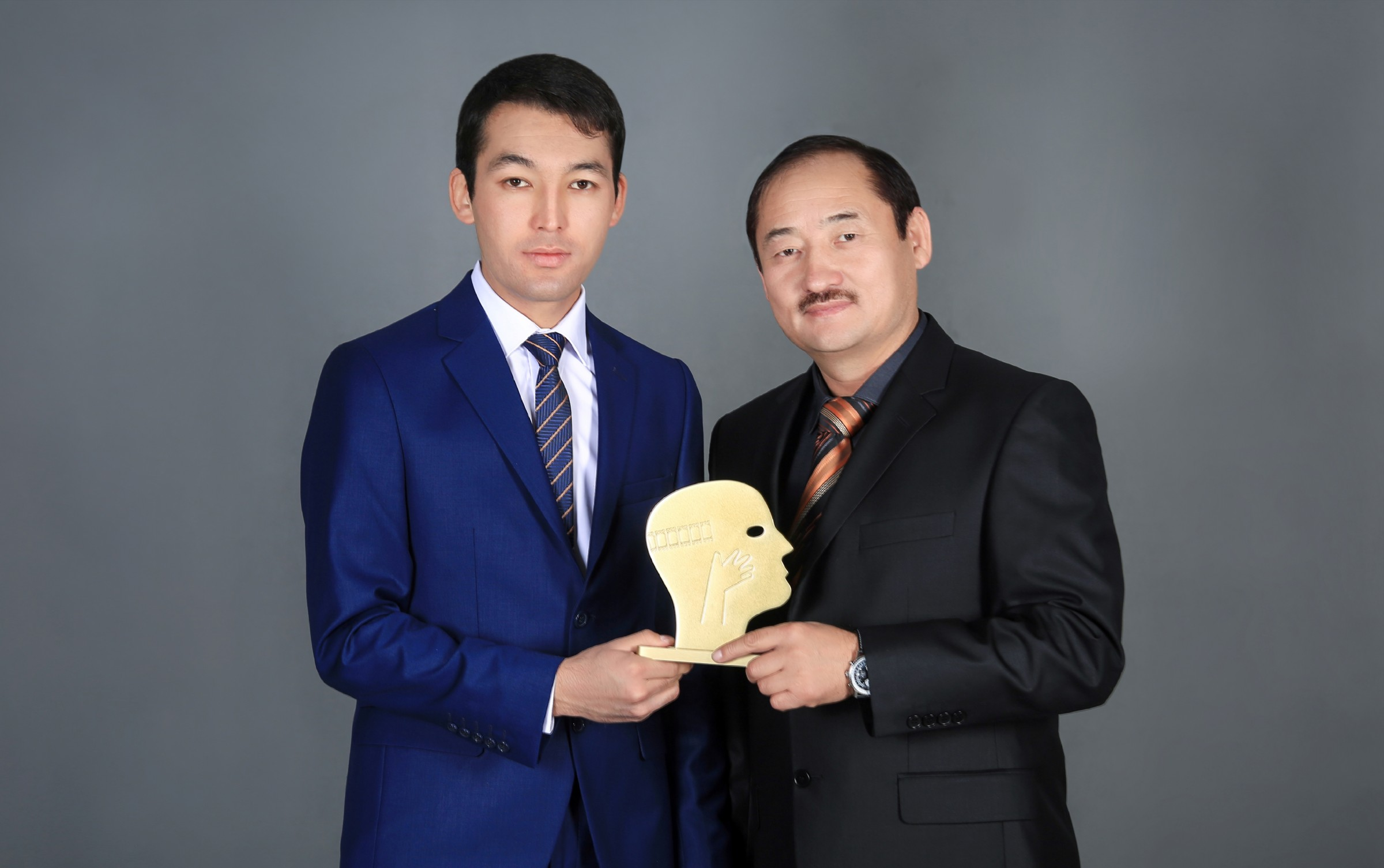 Режиссеры фильма с призом Золотой Зенит Монреальского Мирового кинофестиваля